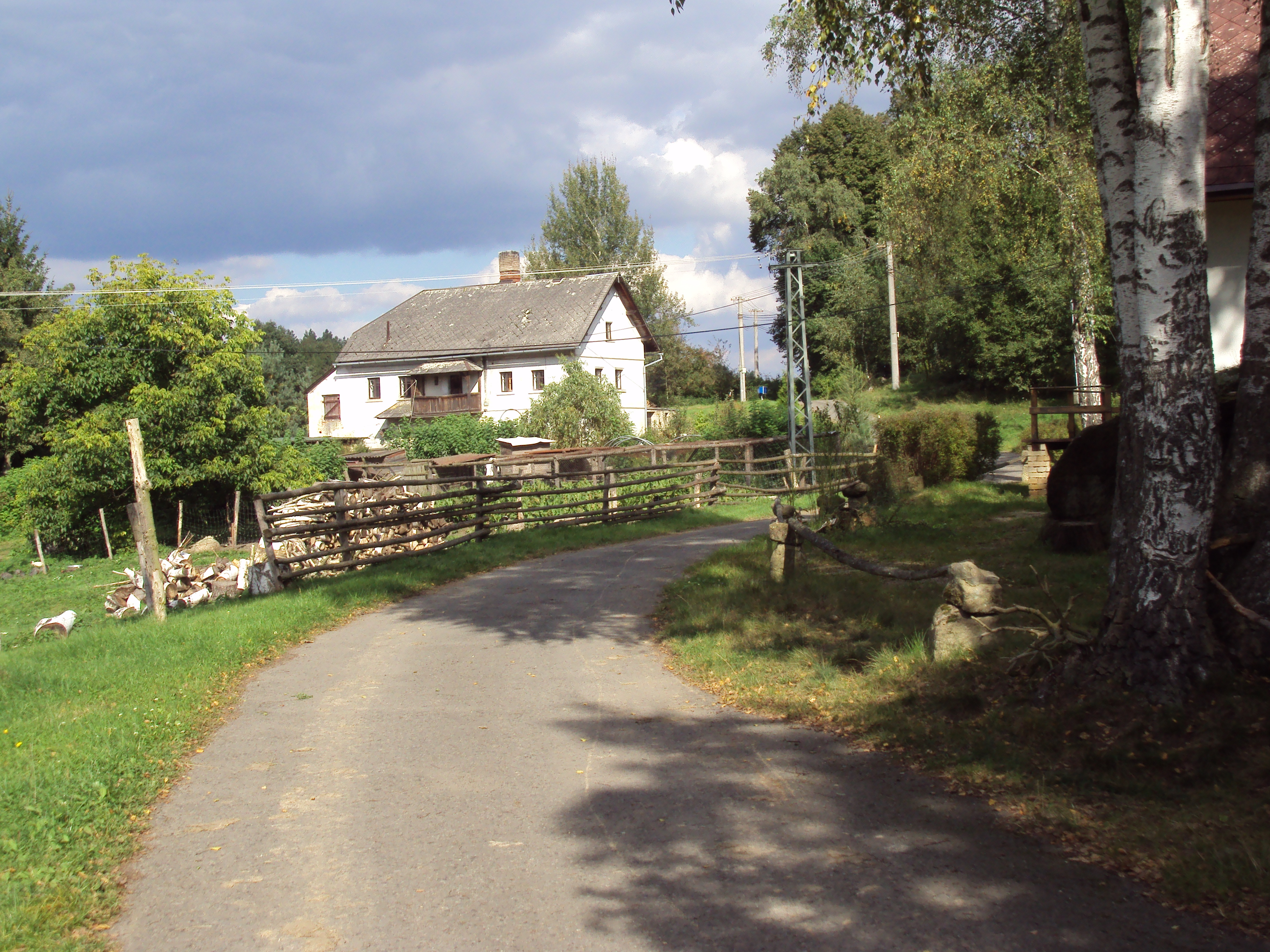 Obec Šidlov je připojena k Zákupům, záběr je z části Nový Šidlov